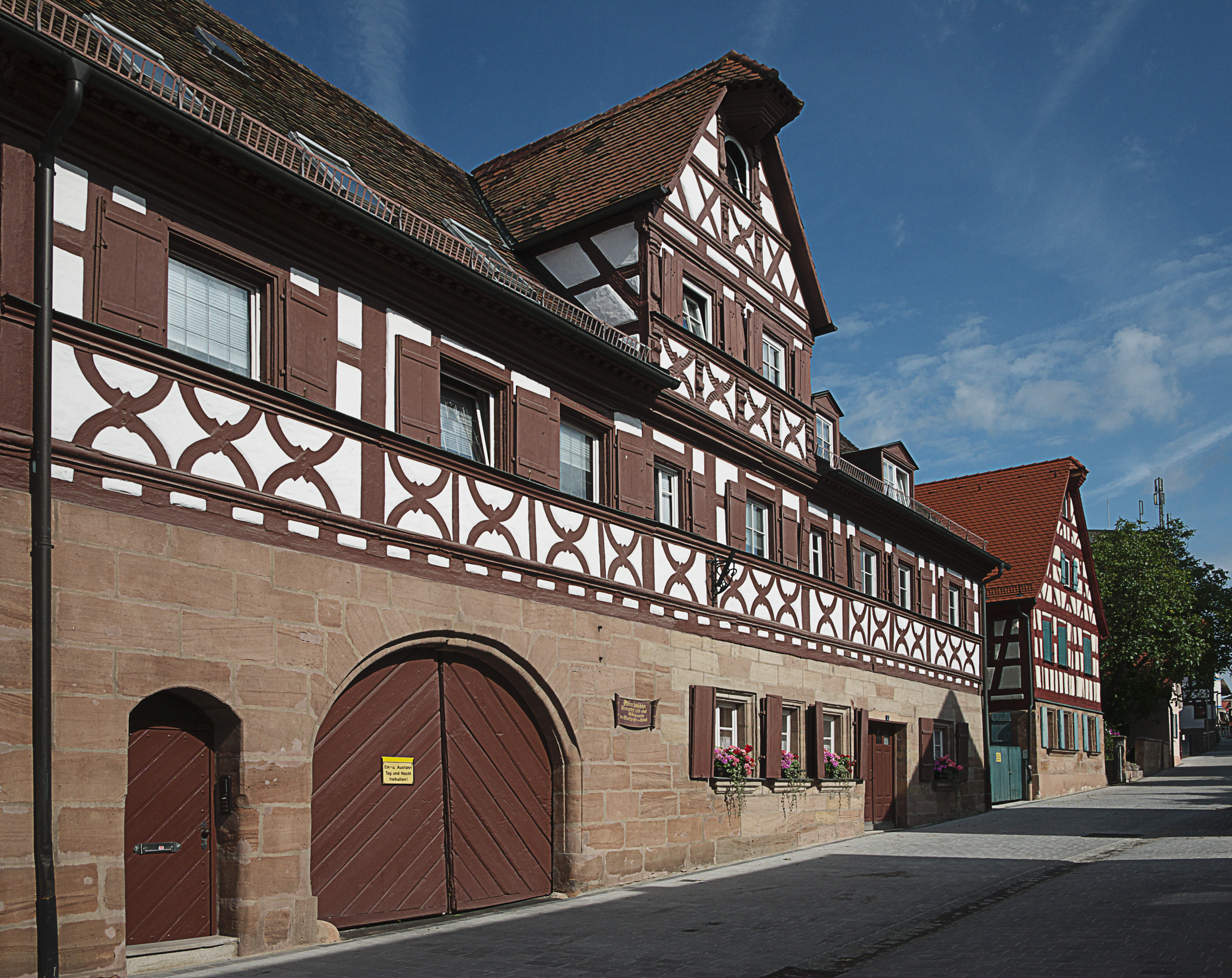 Altes Schlößchen in Zirndorf This is a photograph of an architectural monument.